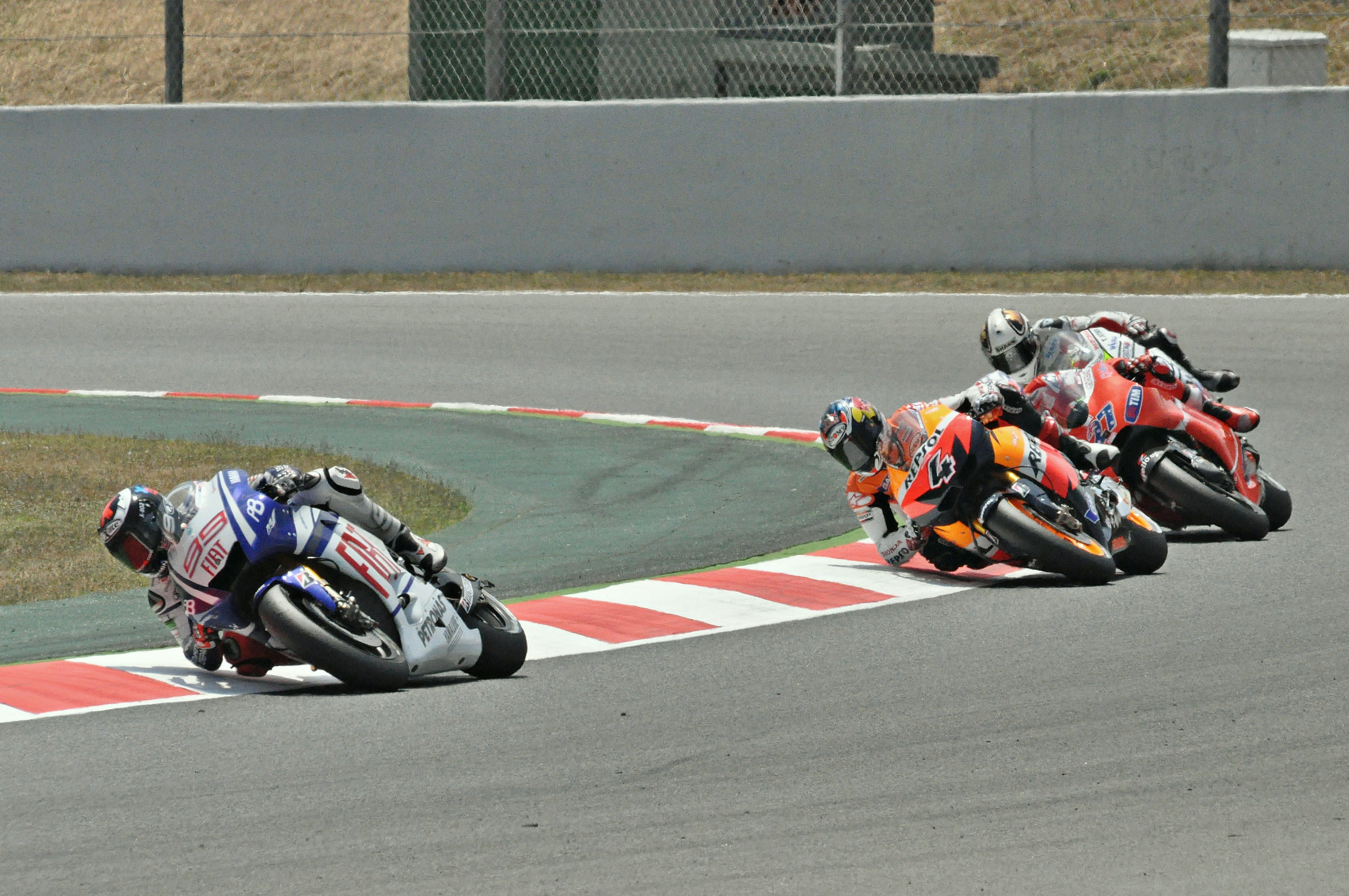 motogp circuito de cataluña 2010